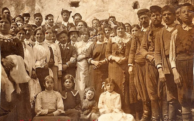 Γάμος στις Πασαλίτες τη δεκαετία του 1920